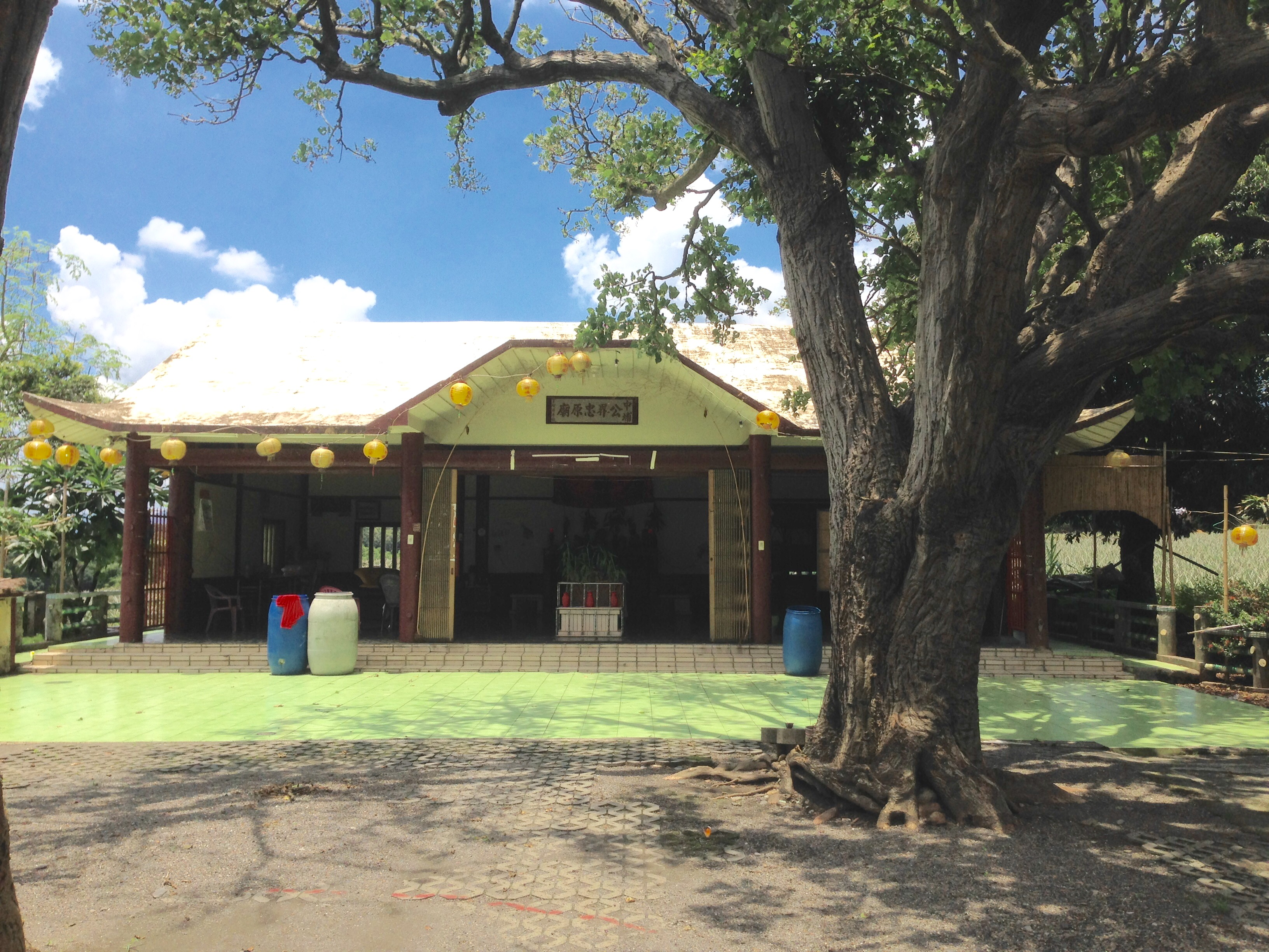 中埔公廨廟廟身